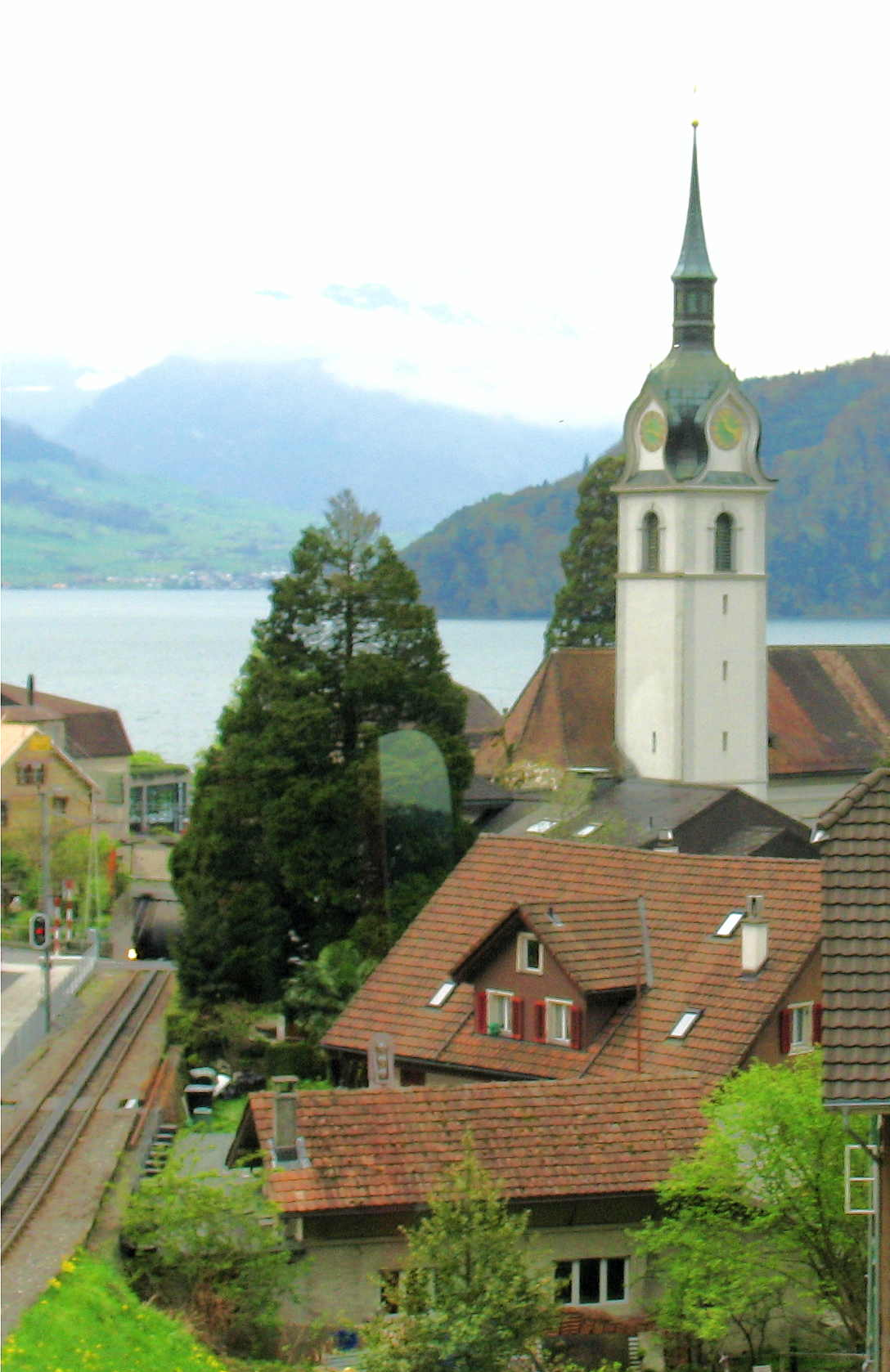 Vitznau